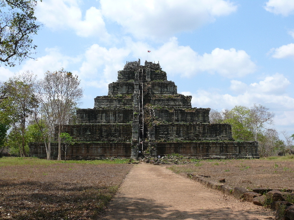 Prasat Thom - Koh Ker